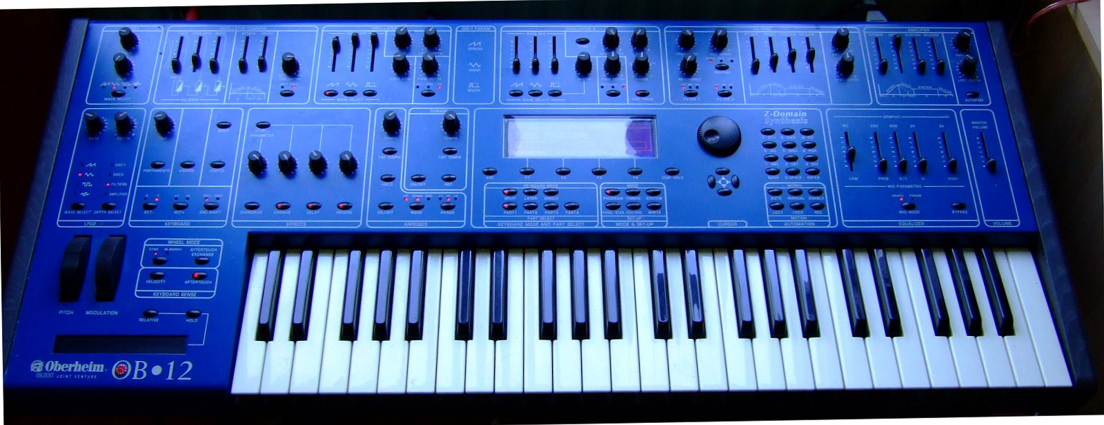 Oberheim-Viscount OB12 synthesizer front panel